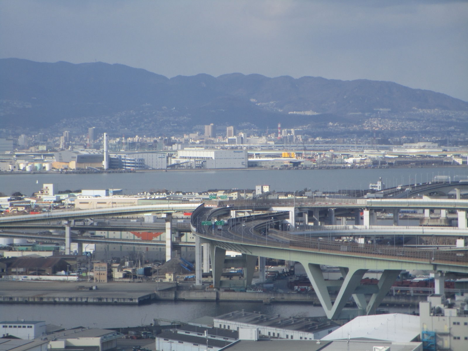 北港ジャンクション（天保山大観覧車より撮影）